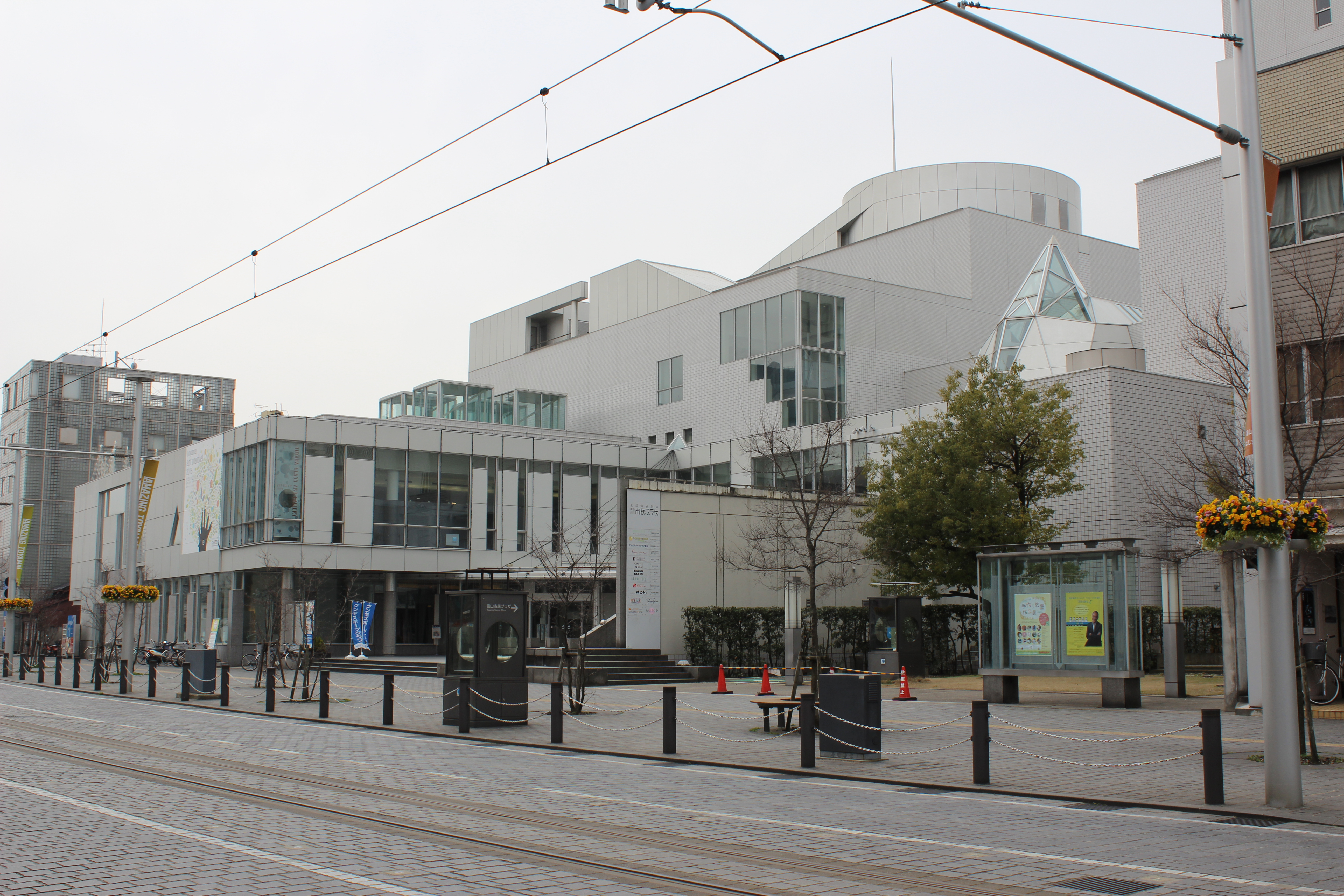 富山市民プラザホール 富山県富山市大手町6番14号